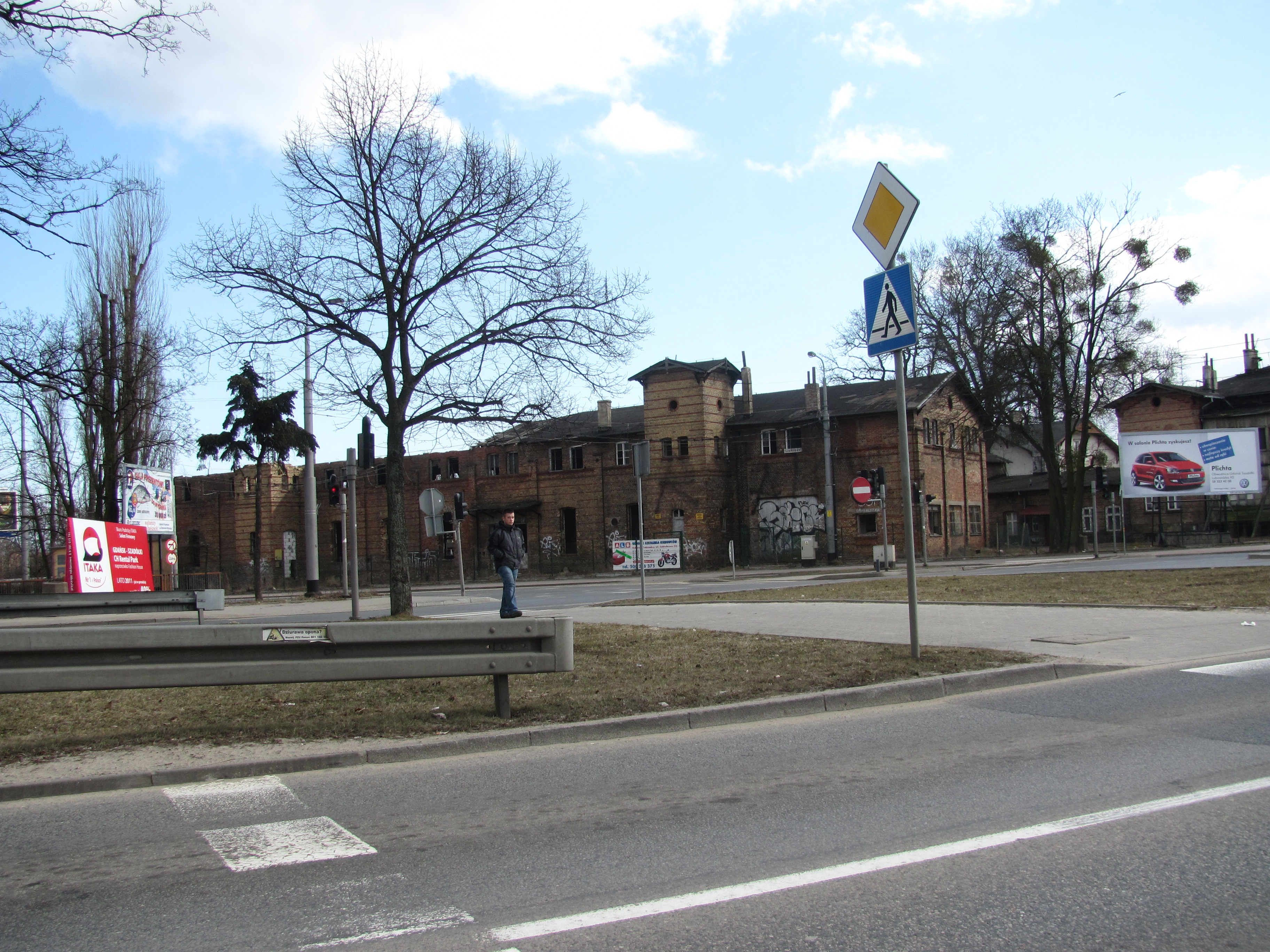 Gdańsk Oliwa, Aleja Grunwaldzka 537 / róg ul. Pomorskiej - dawna fabryka, następnie zajezdnia tramwajowa, 1870 (budynek główny, fasada północna, stan z marca 2011)